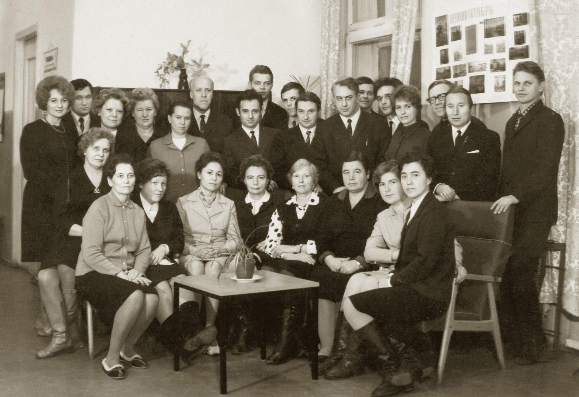 Сотрудники кафедры пропедевтики детских болезней Ленинградского педиатрического института во главе с профессором И. М. Воронцовым